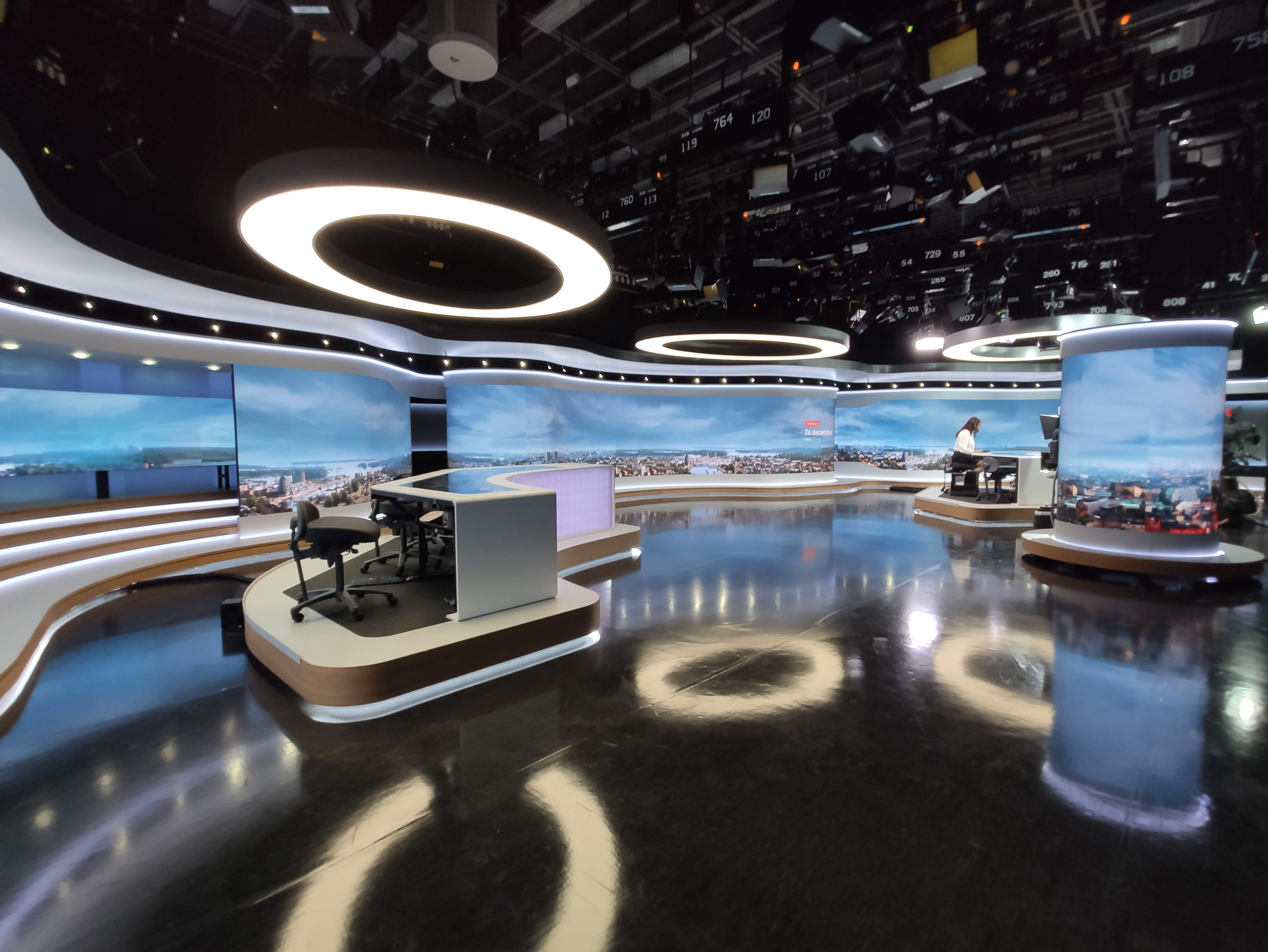 Bilden visar SVT Rapports nya studiodekor från och med 5 december 2019.